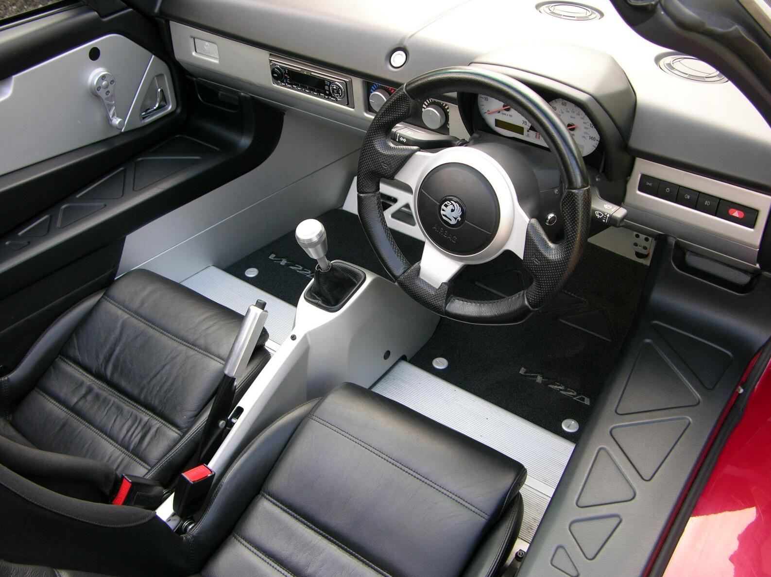 Vauxhall VX220